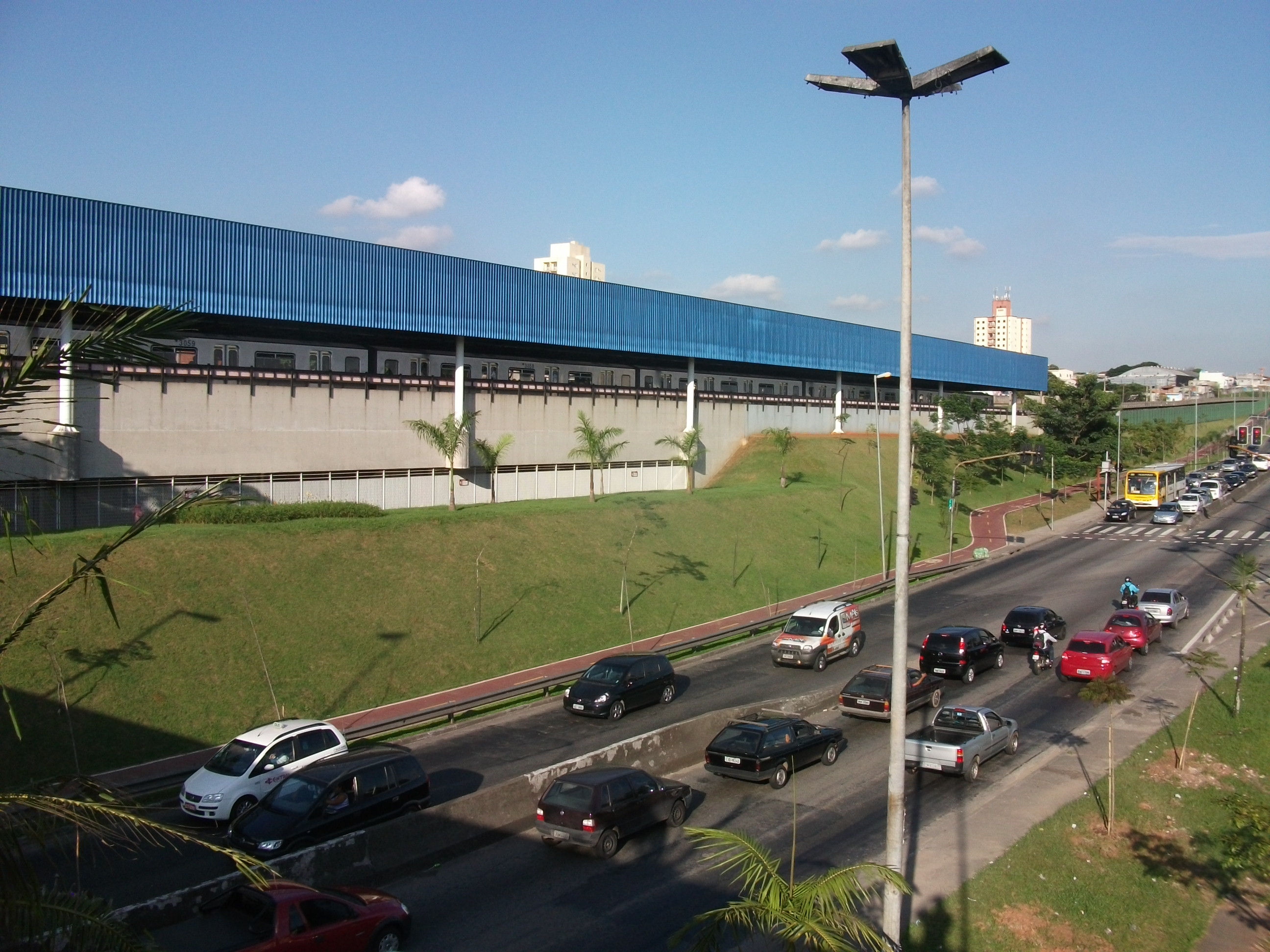 Vista da Estação Patriarca a partir da passarela sobre a Radial Leste.